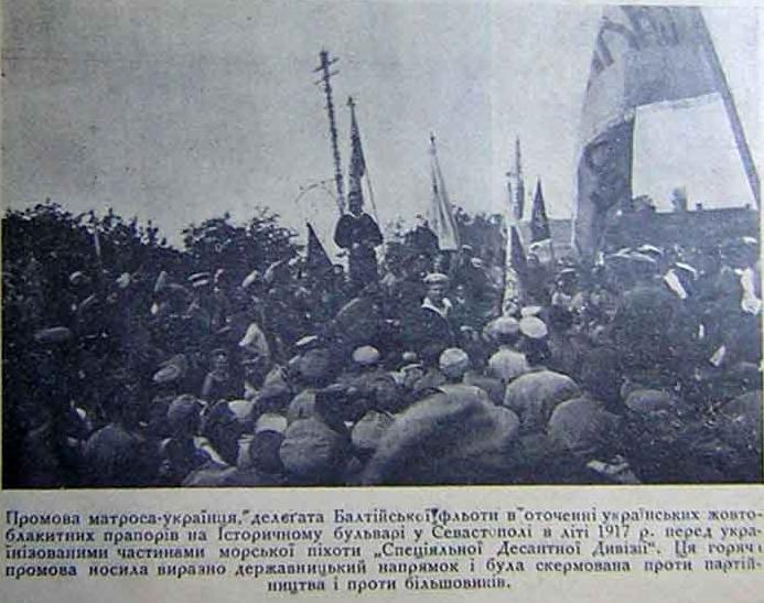 Українська матроська маніфестація у Севастополі.